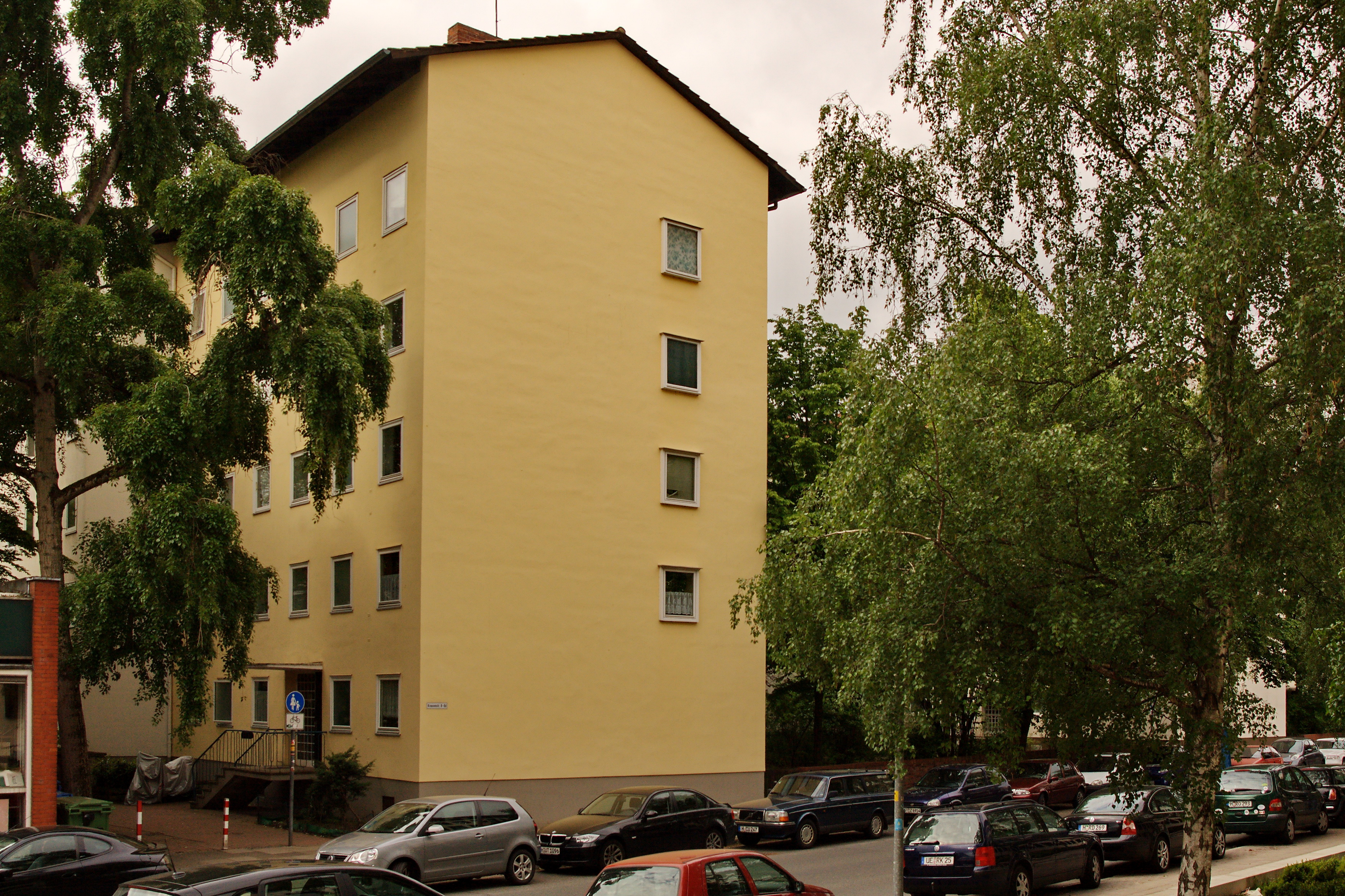 Baudenkmal Krausenstraße (Constructa-Block) in der Südstadt (Hannover), Niedersachsen, Deutschland